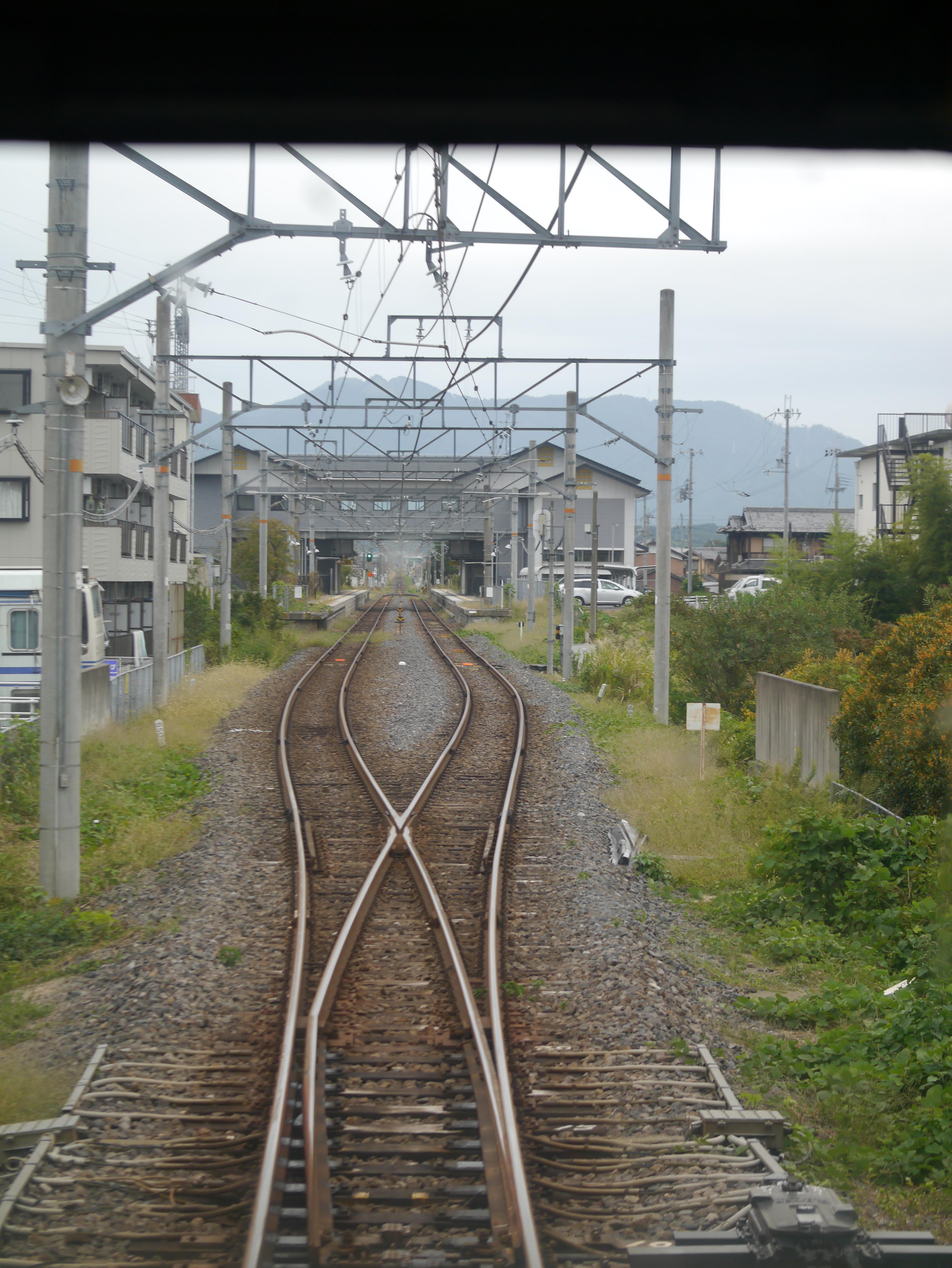 Kokacho Oharaichiba, Koka, Shiga Prefecture 520-3433, Japan